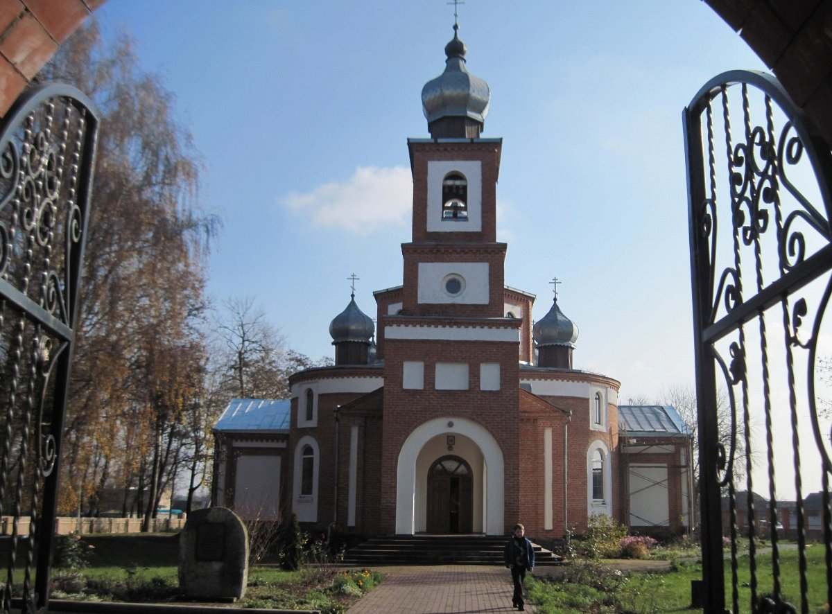 Лельчыцы. Царква Святой Тройцы